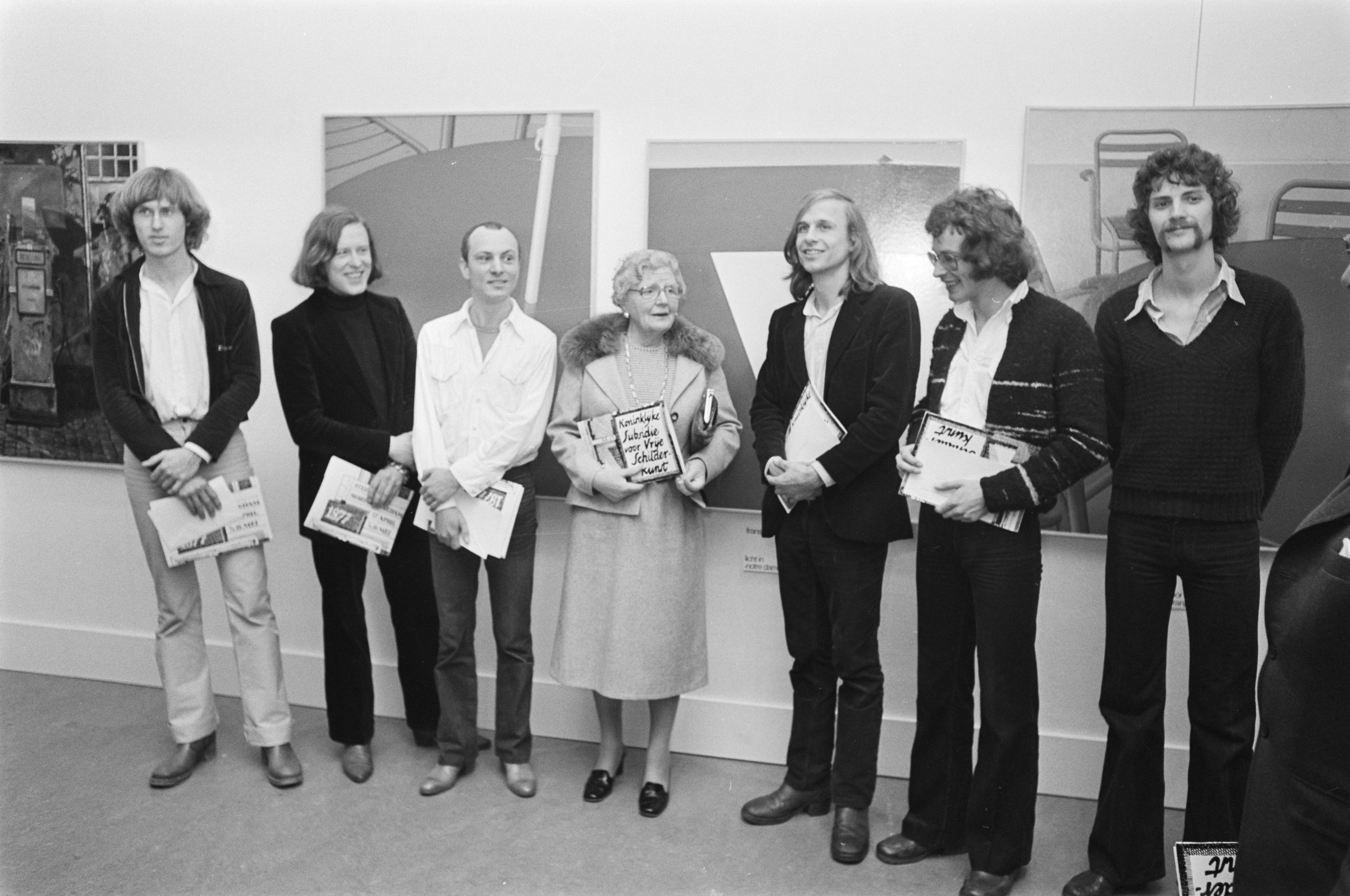 Collectie / Archief : Fotocollectie Anefo Reportage / Serie : Koningin Juliana woont uitreiking Koninklijke Prijs Vrije Schilderskunst bij Beschrijving : Koningin Juliana, geflankeerd door v.l.n.r. Albert Verkade, John van 't Slot, Thijs, Frans van Veen, Hendriks, Van [tekst afgebroken] Datum : 26 april 1977 Trefwoorden : koninginnen, kunstenaars, onderscheidingen, schilderkunst Persoonsnaam : Hendriks, {...}, Juliana (koningin Nederland), Juliana (koningin Nederland), Slot, John van 't, Veen, Frans van, Verkade, Albert Fotograaf : Fotograaf Onbekend / Anefo Auteursrechthebbende : Nationaal Archief Materiaalsoort : Negatief (zwart/wit) Nummer archiefinventaris : bekijk toegang 2.24.01.05 Bestanddeelnummer : 929-1446